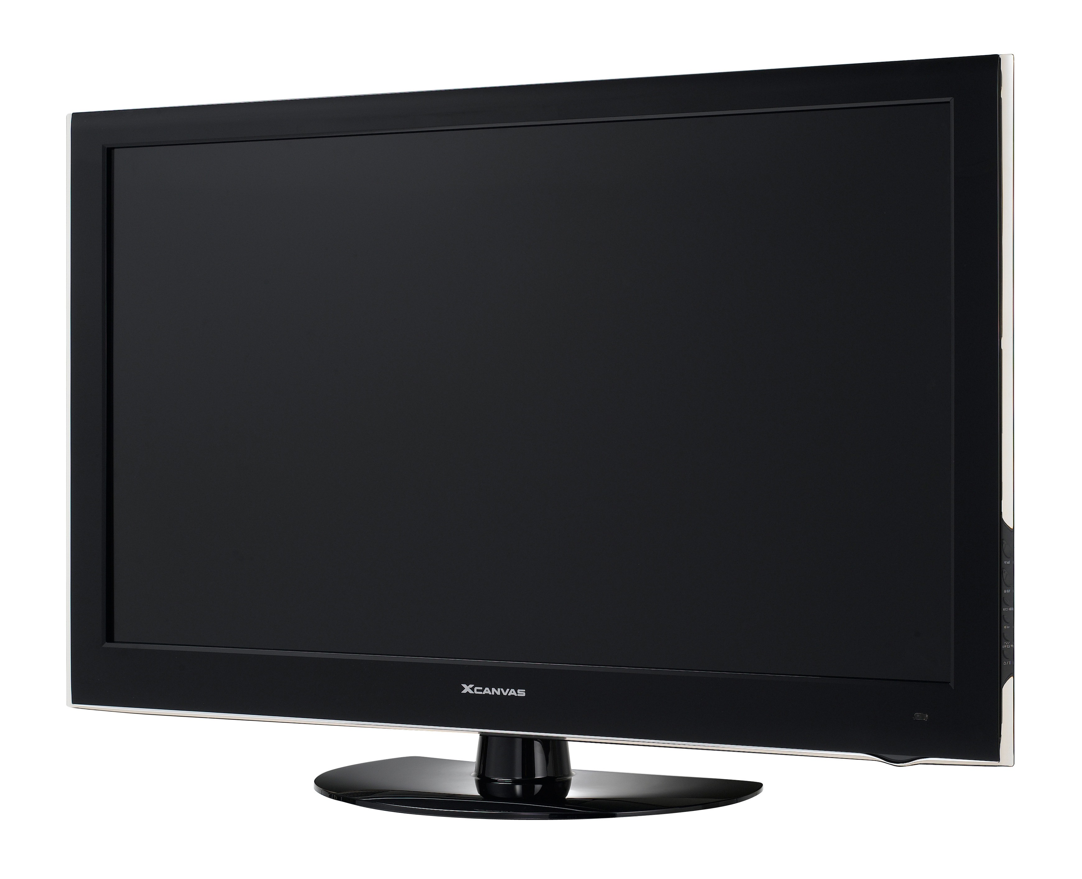 ■ 美 ‘LCD TV 구매 가이드’ 평가서 전체 1위, 화질?기능 등 경쟁력 인정받아 ■ 240Hz 라이브스캔 기술로 기존 영상과 현재 영상이 겹쳐지는 잔상의 원인 제거 ■ 화면 프레임에 푸른 빛의 투명 유리 입혀 화면이 공간에 떠있는 듯한 느낌 구현 ■ 외장하드, USB 메모리를 TV에 꽂아 영화, UCC를 간편하게 즐기는 동영상 재생 기능도 LG전자(066570, 대표 南 鏞, 빠르고 역동적인 화면에서도 끌림과 잔상이 없는 240Hz(헤르츠) LCD TV 신제품(모델명: 42/47 LH50)을 11일 국내 시장에 선보였다. 이 제품은 지난 5월 미국에 출시돼 LCD TV 리뷰 전문지인 ‘LCD TV 구매 가이드(Buying Guide)’의 평가에서 100점 만점에 93.25점으로 전체 1위를 차지, 화질과 기능 등에서 경쟁력을 인정받았다. 백라이트 스캐닝으로 1초에 240장의 영상을 구현하는 240Hz 라이브스캔 기술을 통해 기존 영상과 현재 영상이 겹치면서 생기는 잔상의 원인 자체를 없앴다. 화면 프레임에 푸른 빛의 투명한 유리를 입혀 마치 화면이 공간에 떠있는 듯한 느낌을 주며, 제품 테두리에는 은색을 입혀 세련미를 더했다. 외장하드나 USB 메모리 같은 저장매체를 TV에 꽂아 다양한 파일 형식의 영화, UCC 등을 간편하게 즐기는 동영상 재생 기능, 간단한 리모컨 조작으로 전문가급 화질 설정이 가능한 화질 마법사 기능도 추가했다. 또, 섬세하고 선명한 자연색을 구현하는 ‘컬러 디캔팅(Color Decanting)’ 기술과 초소형 센서가 주변 조명 변화를 감지해 화면 밝기를 자동으로 조절함으로써 에너지를 줄이고 시력을 보호하는 ‘아이큐 그린(EYEQ Green)’ 기술도 적용했다. LG전자 한국지역본부 HE마케팅팀장 이우경 상무는 “풀HD급 LCD TV 3대 중 1 꼴로 판매될 만큼 스포츠나 영화 등 빠른 영상에 강한 240Hz LCD TV가 인기를 얻고 있다”고 말했다. (끝) ▶ 출하가(스탠드, 벽걸이 지지대 별도) 47인치 250만원, 42인치 170만원